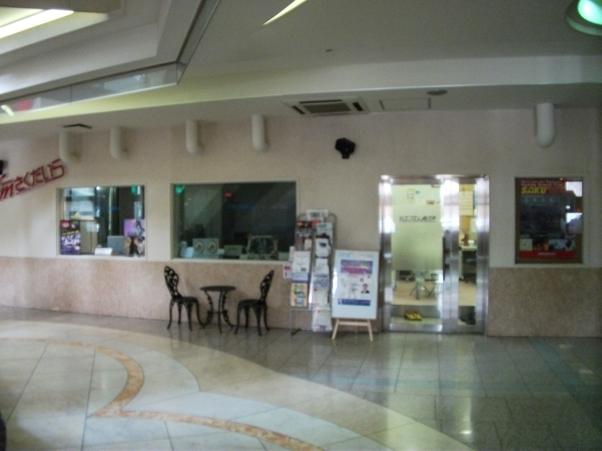 長野県佐久市、エフエム佐久平サテライトスタジオ（佐久平駅内）